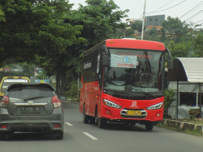 Koridor 8 - Zeppelin M5 Trans Semarang Operated by PT Mekar Flamboyan Sendang Mulyo Jaya